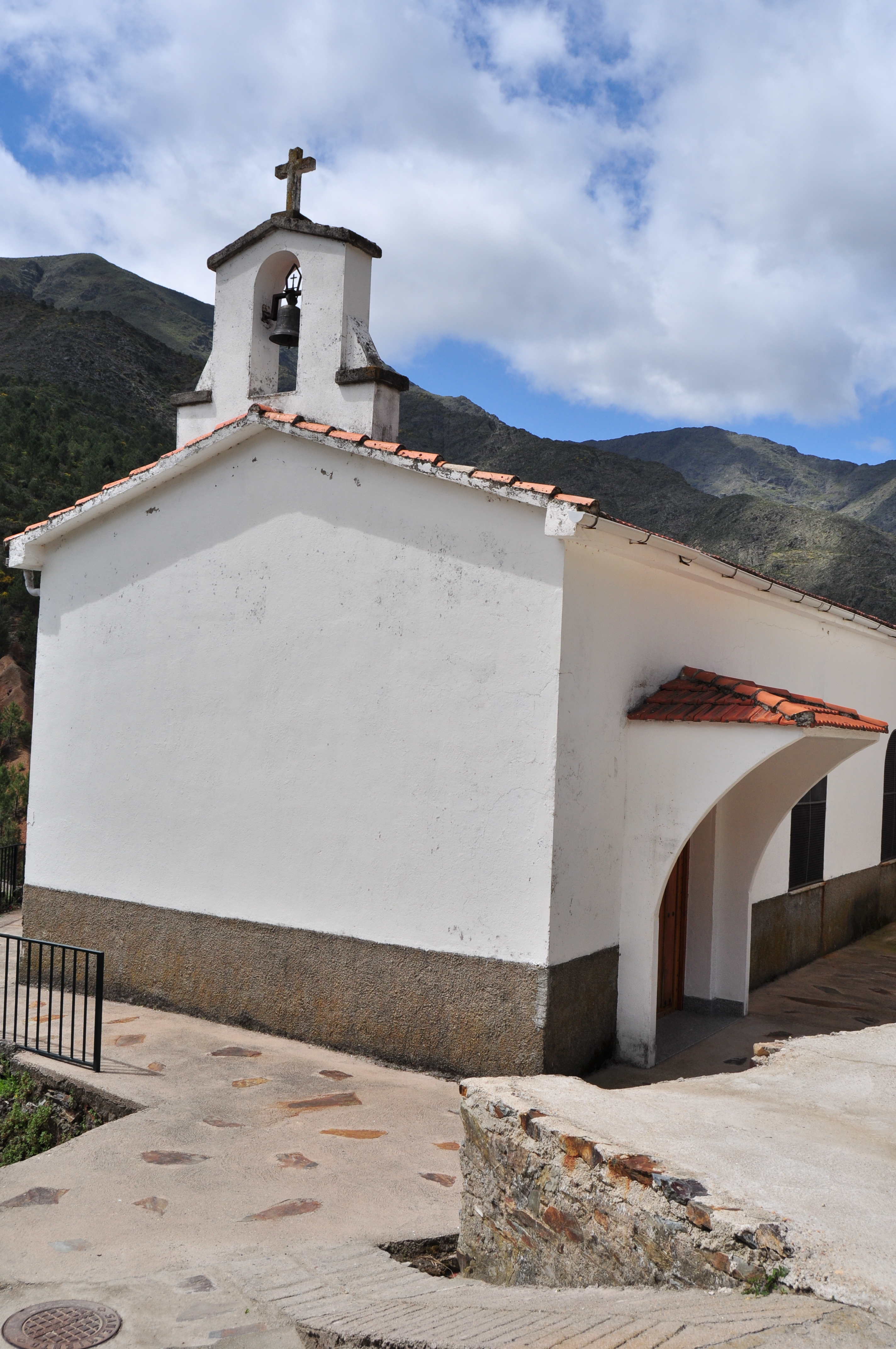 Huetre (Casares de las Hurdes) - 005